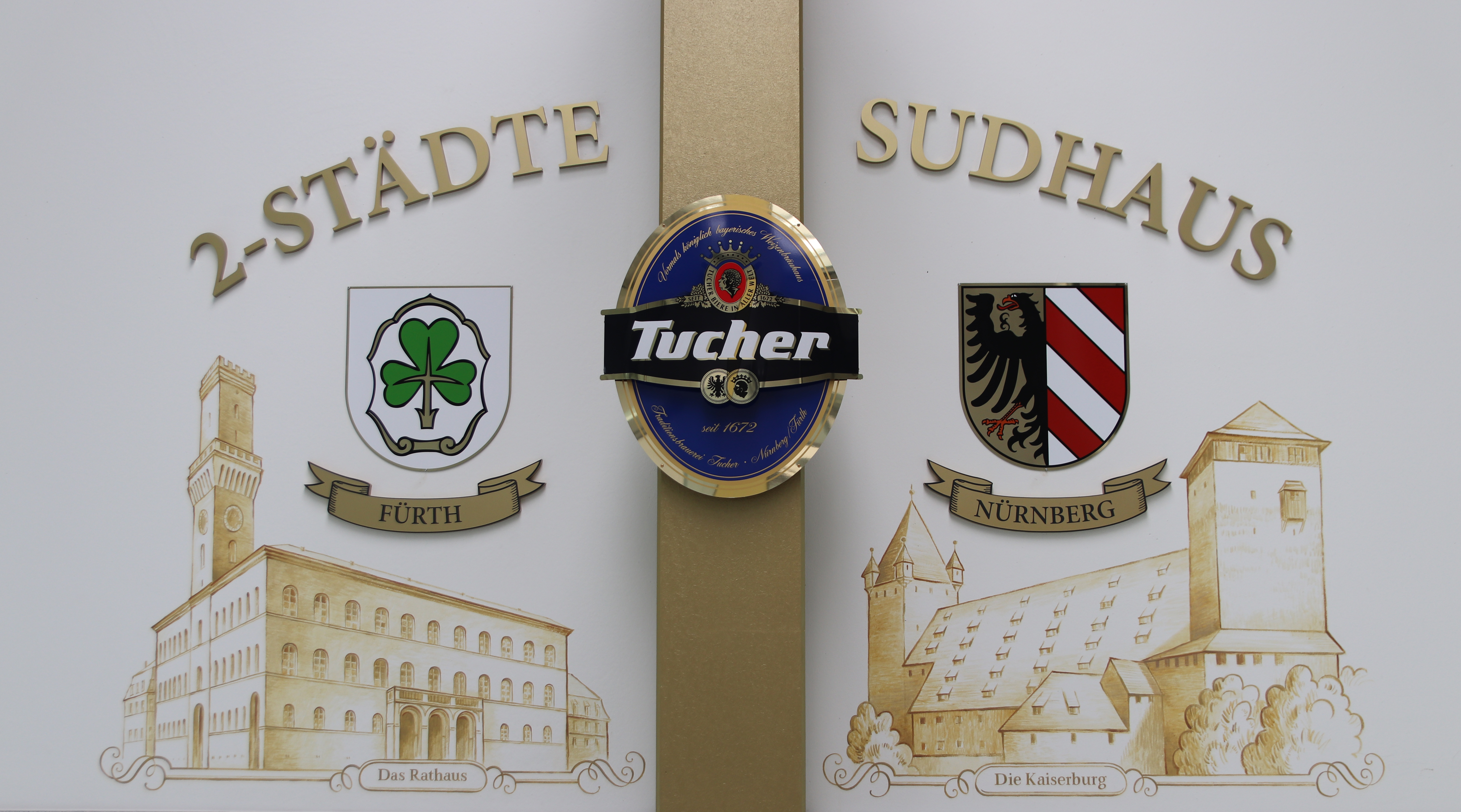 Wandgemälde im Sudhaus der Tucherbrauerei auf der Stadtgrenze Fürth/Nürnberg